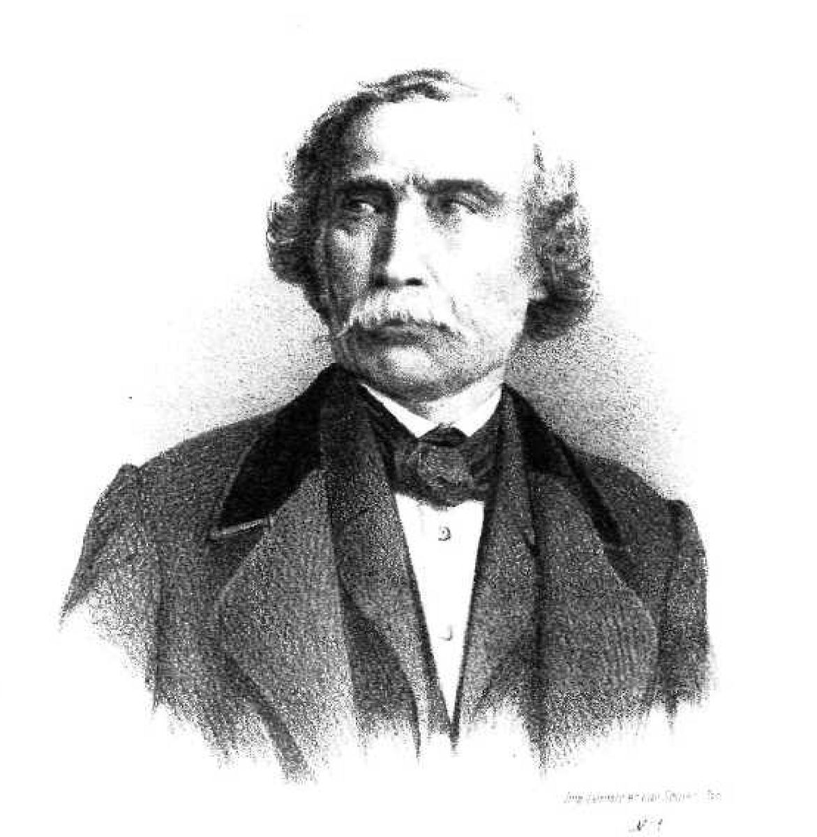 Griechischer Politiker, 19. Jahrhundert